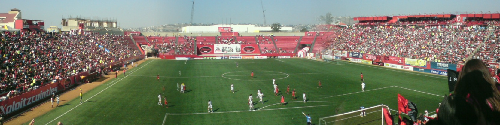 Estadio en construccion